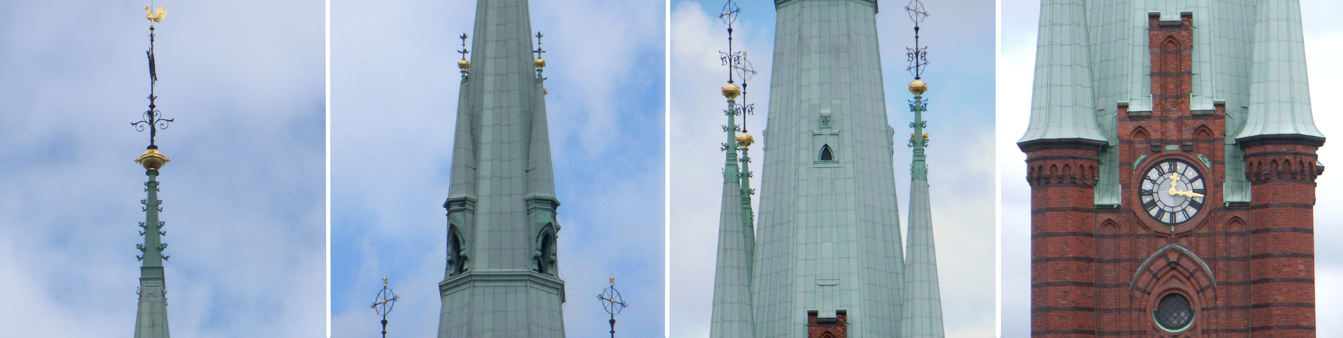 Klara kyrkas torn, collage